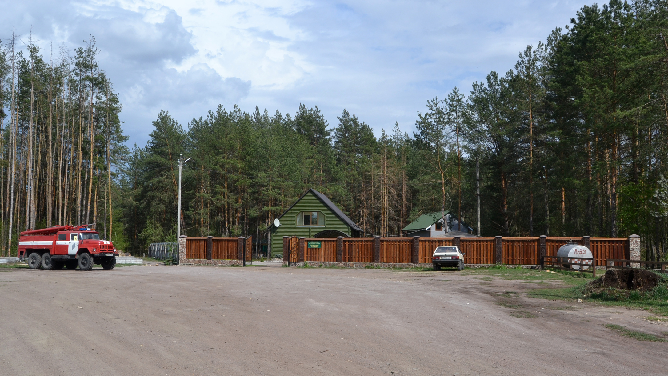 Управління ушомирського лісництва. Коростенський лісгосп АПК